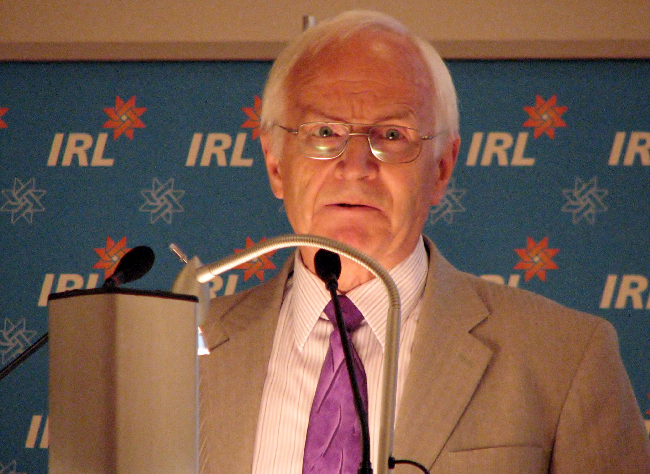 Olav Aarna esinemas IRL-i hariduskonverentsil